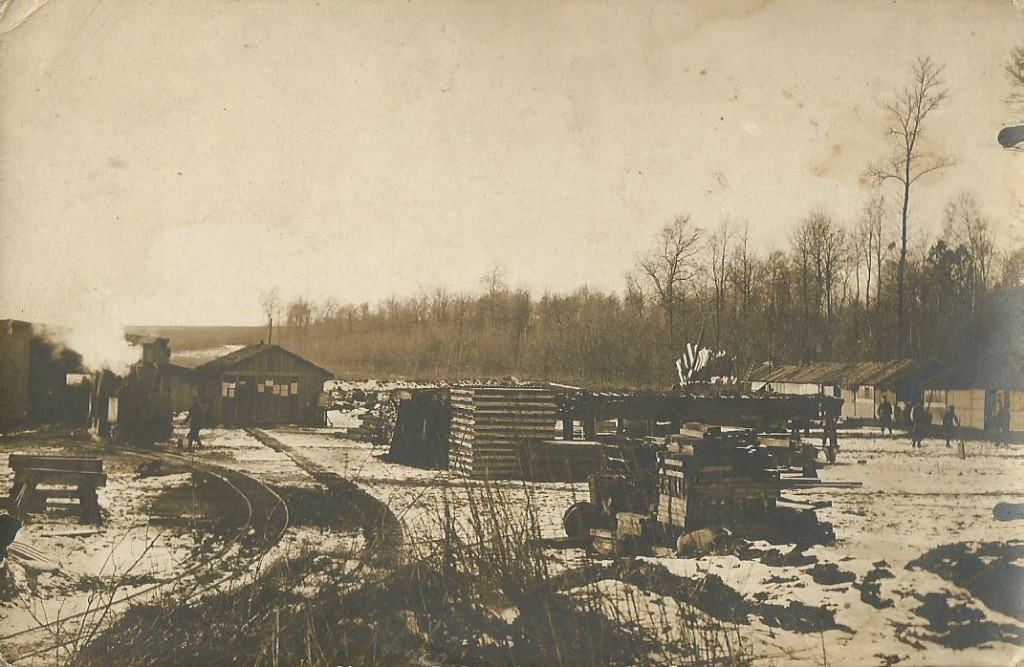 La gare de Foreste en 1919.